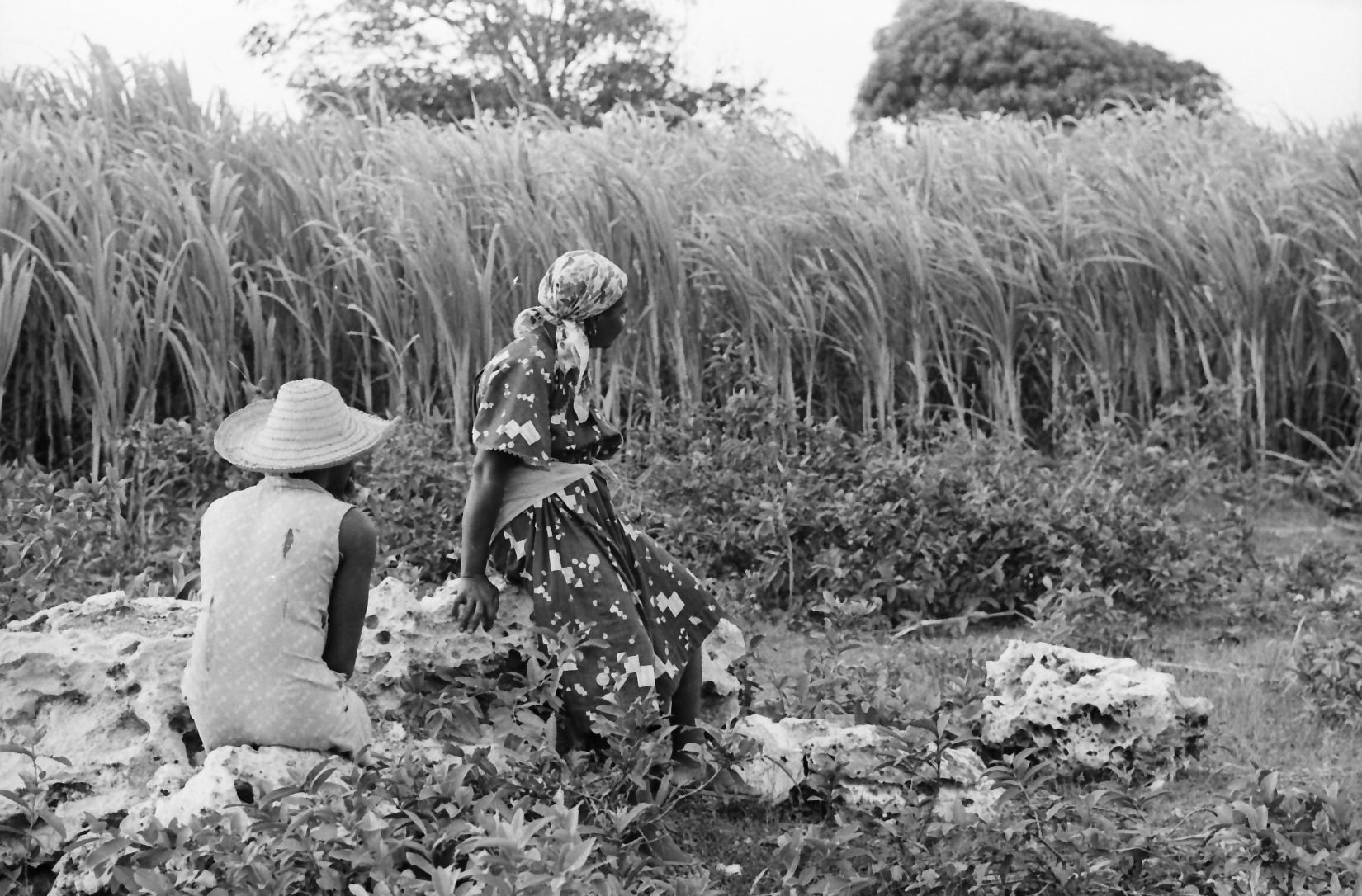 Photographie issue des collections du musée